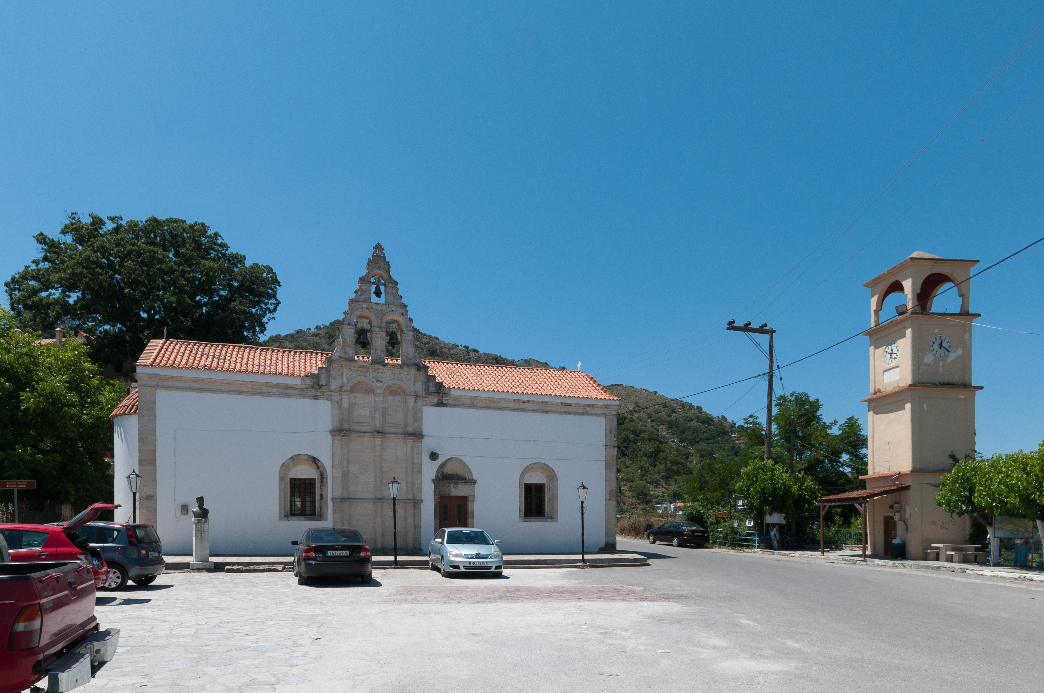 Kościół św. Jana w Argyroupoli, region Rethymno.